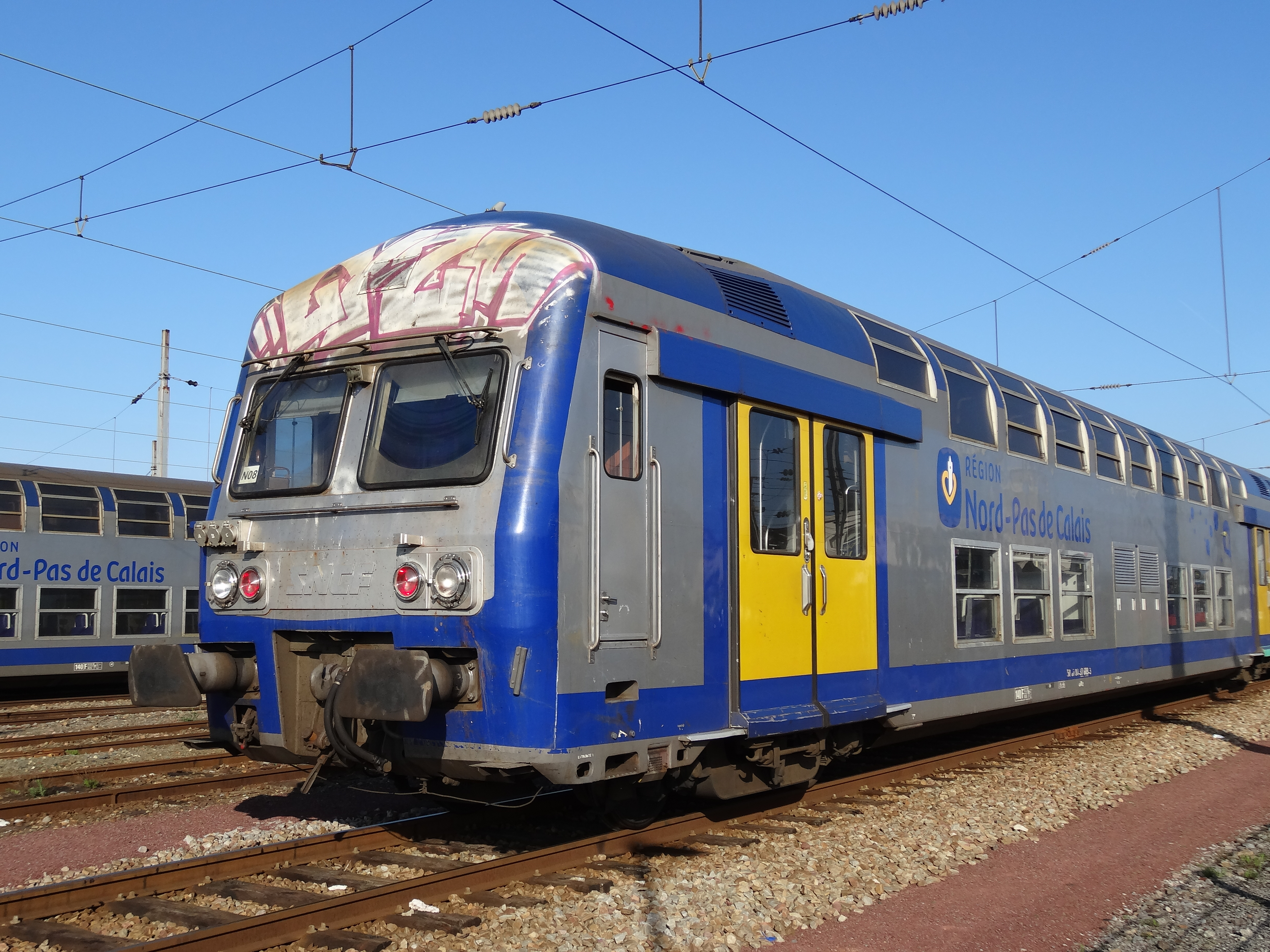 Gare de Lens, Pas-de-Calais, Nord-Pas-de-Calais, France.